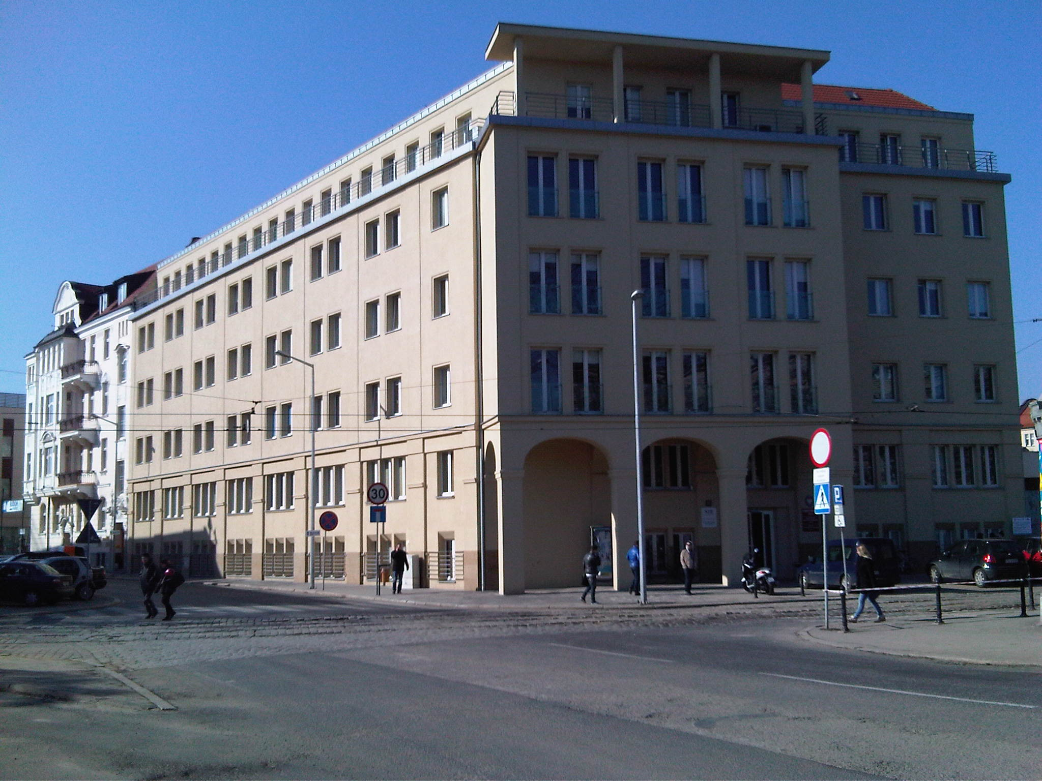 Uniwersytet Ekonomiczny w Poznaniu - budynek C przy ulicy Towarowej.